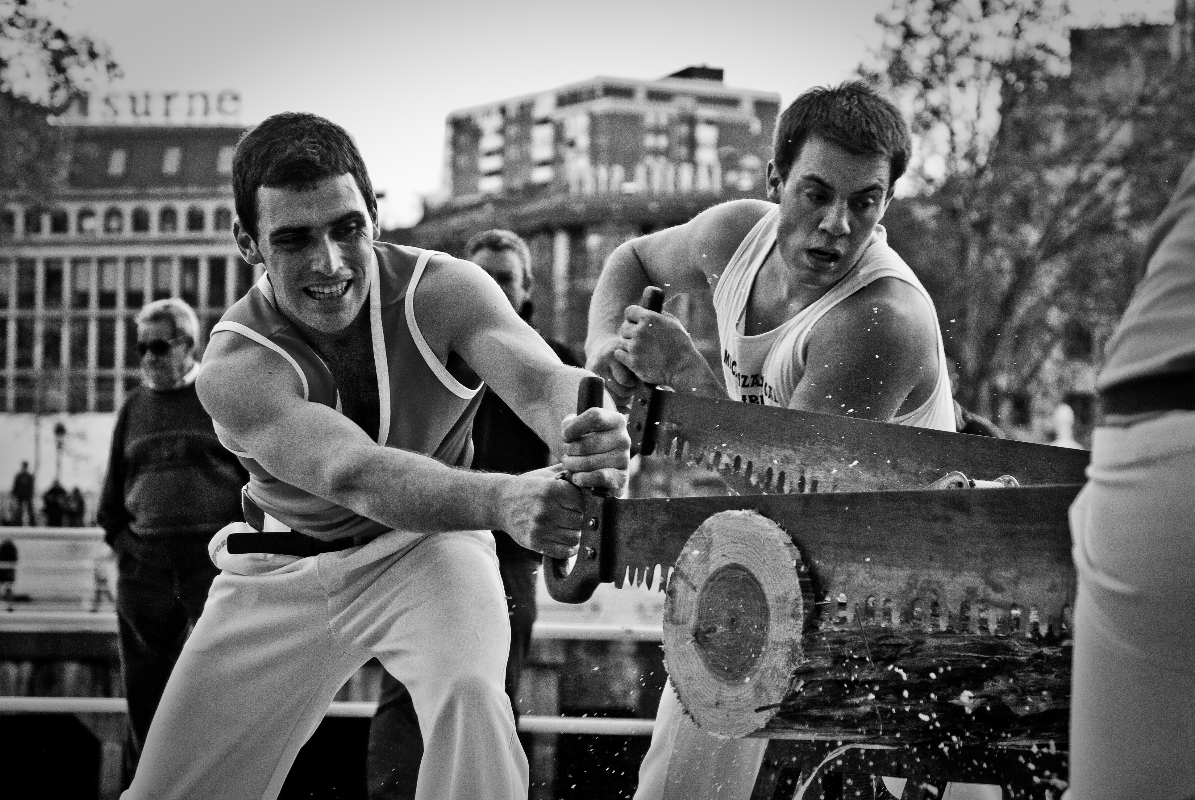 Trontza, Bilbao. Bizkaia, Euskal Herria. Wood chopping, Bilbao. Bizkaia, Euskal Herria.